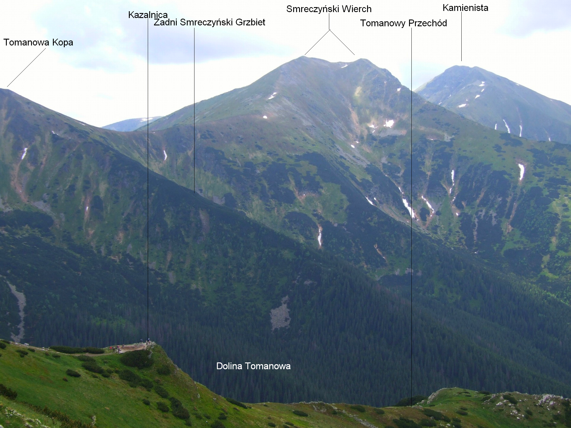 Widok z północno-wschodniej strony